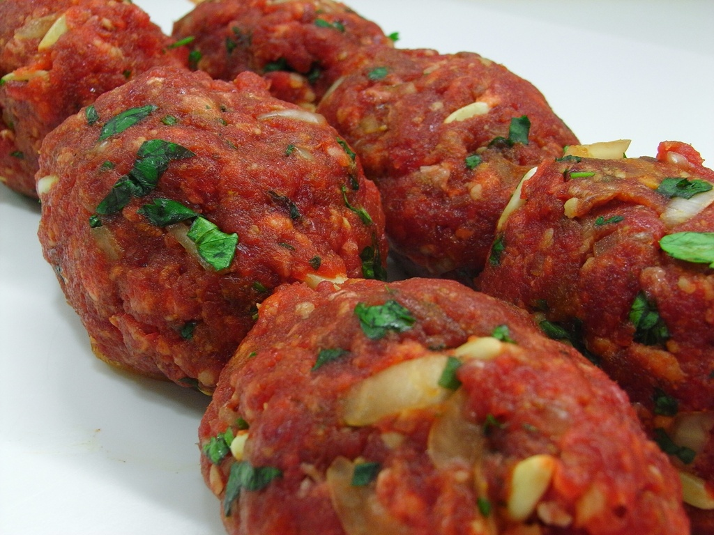 Kefta